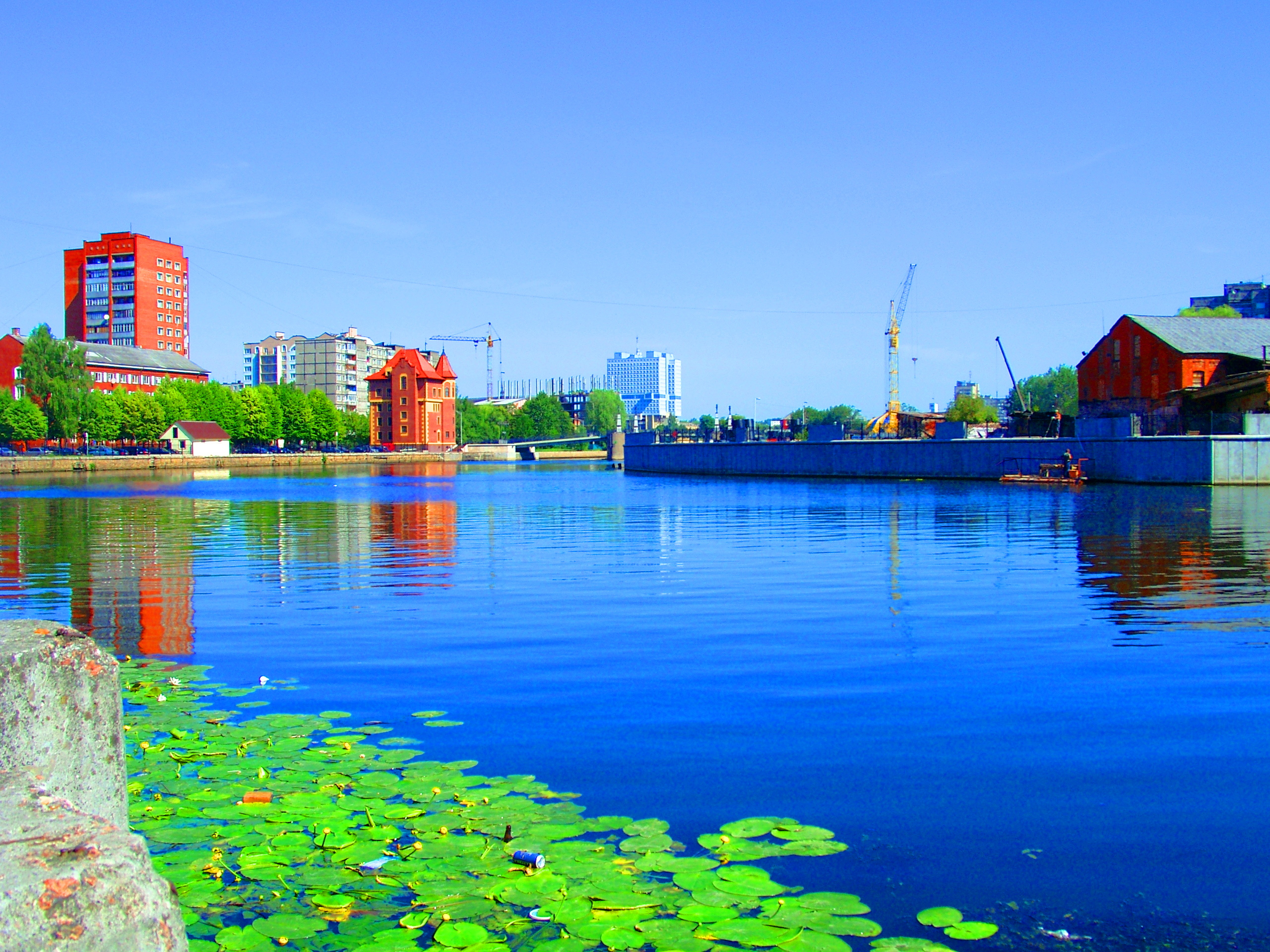 Преголя